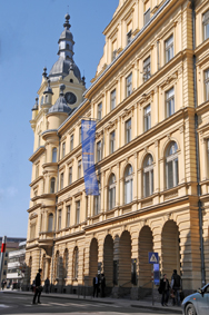 MCI Technik Standort in Innsbruck/Maximilianstraße Die ehemalige Hauptpost beherbergt die Technologie- und Life Science-Studiengänge des MCI mit fast 1.000 Studierenden.